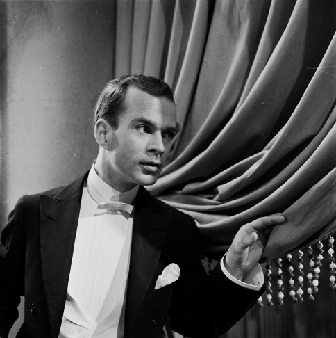 Henk van Ulsen op de set van Gasten op het kasteel in 1957